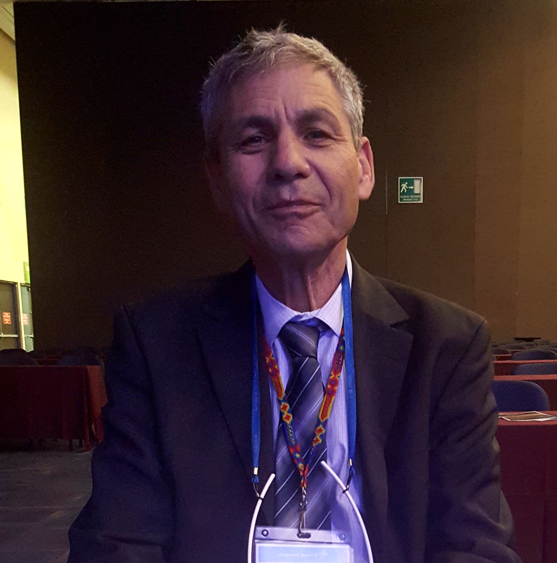 אבי בלסברגר, מנהל סוכנות החלל הישראלית